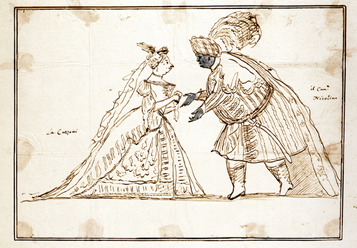 Die Sopranistin Francesca Cuzzoni und der Kastrat Nicolò Grimaldi (Nicolino), Karikatur von Antonio Maria Zanetti